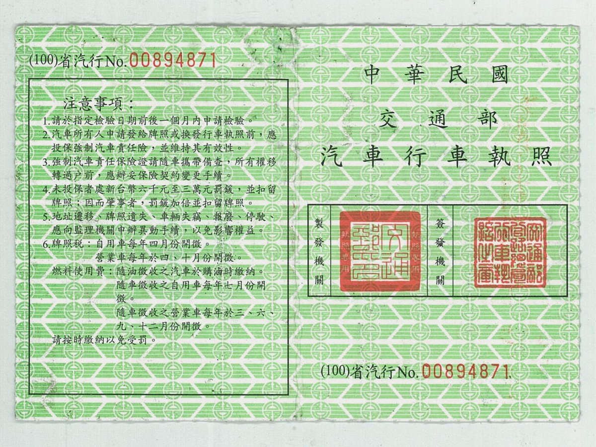 中華民國交通部汽車行車執照4116-QB正面，背景圖案為交通部公路總局局徽。